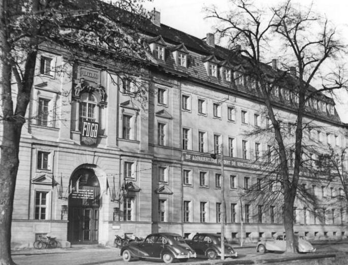 Zentralbild-Dörr 52305 9.1.58 Heis-L Wiederaufbau in Potsdam Das Haus der Gewerkschaften.